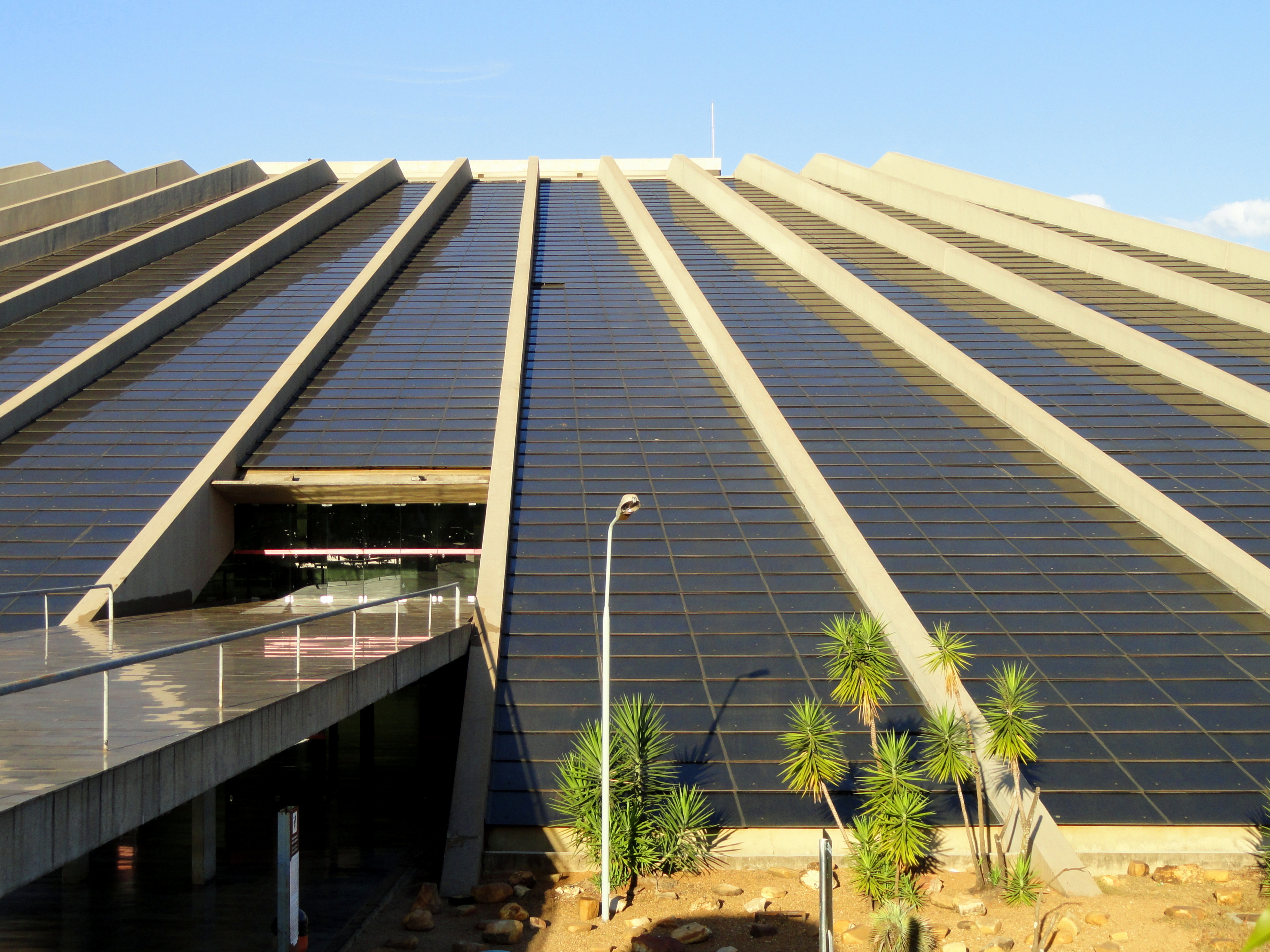 Teatro Nacional Cláudio Santoro, Brasília, Brazil.